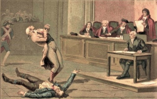 "Il processo di Babeuf", opera di autore sconosciuto